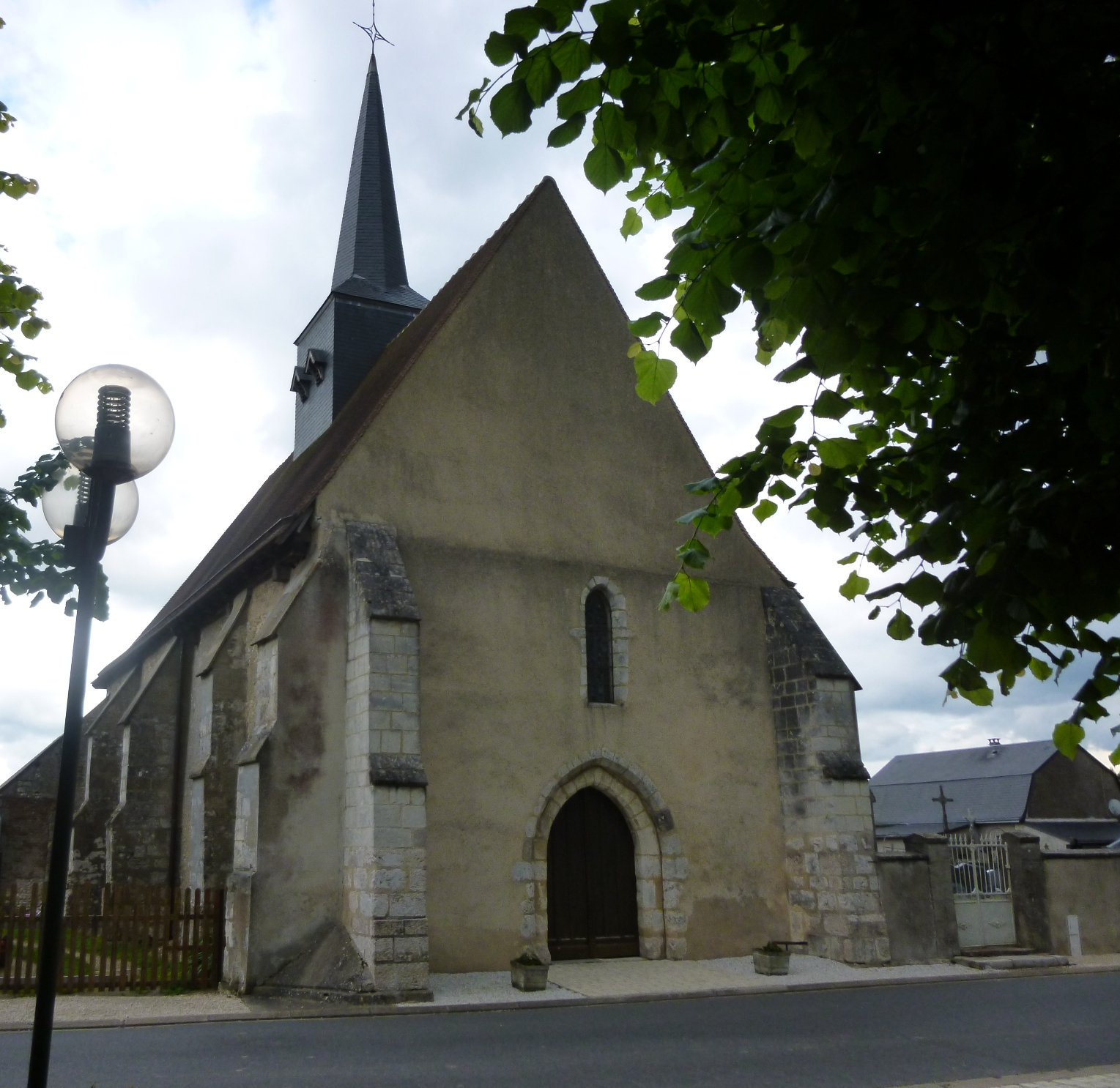 Eglise de Huisseau-en-Beauce